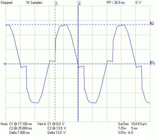 Messaufzeichung von einer Phasenanschnittssteuerung (Original text: Oszilloskopausdruck)